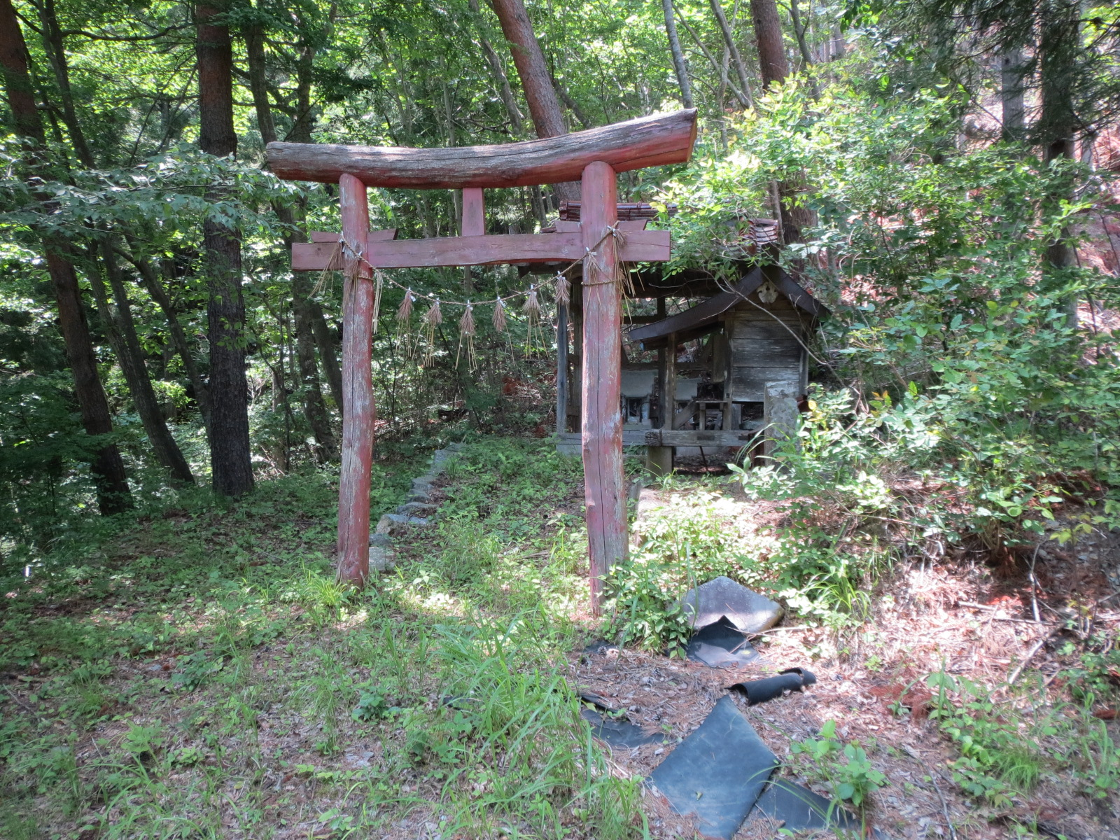 逃避行した源義経一行を偲び、当地の人が建てたとされる祠。「判官」は義経の役職。